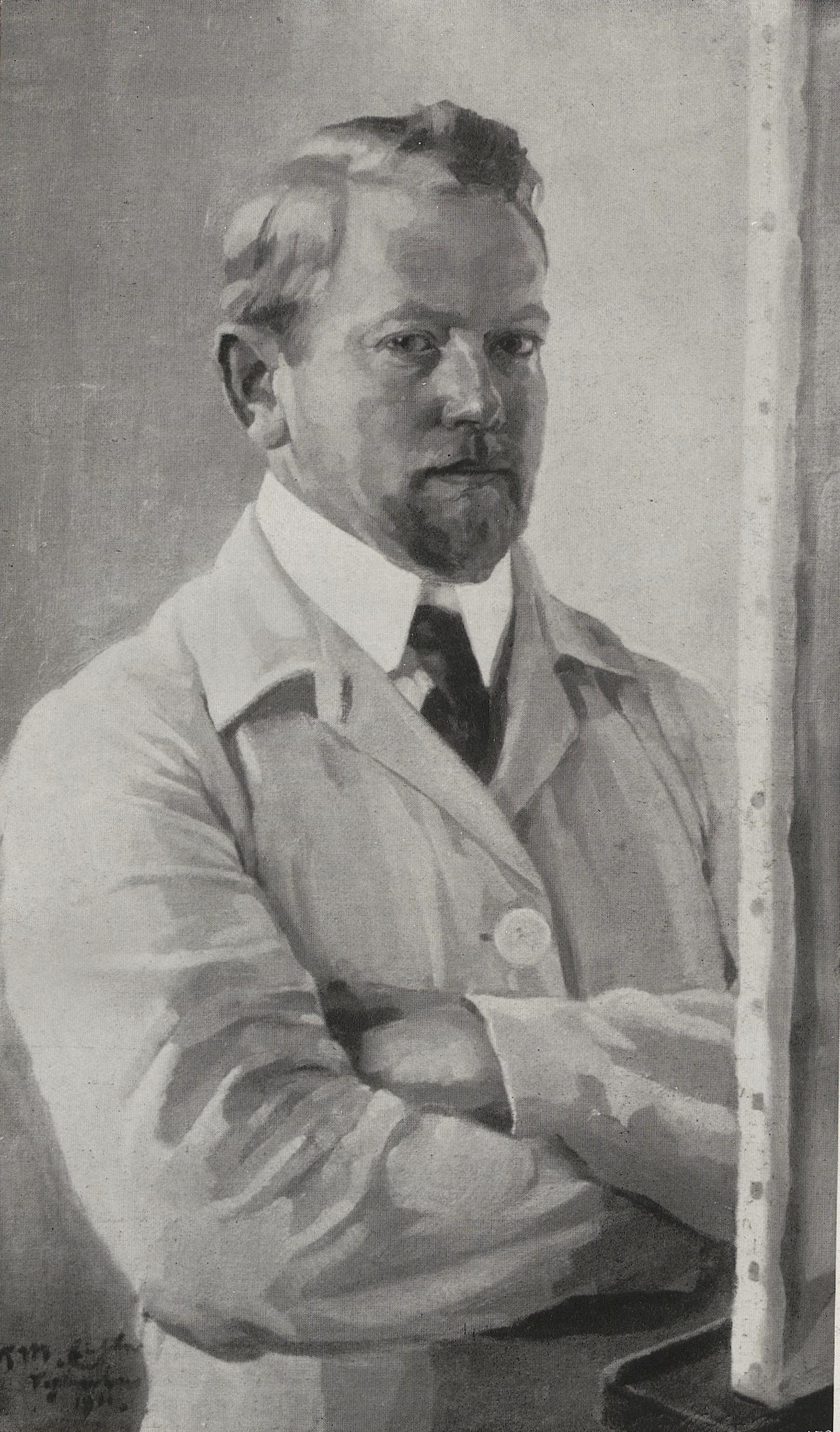 Reinhold Max Eichler: Selbstbildnis, 1911